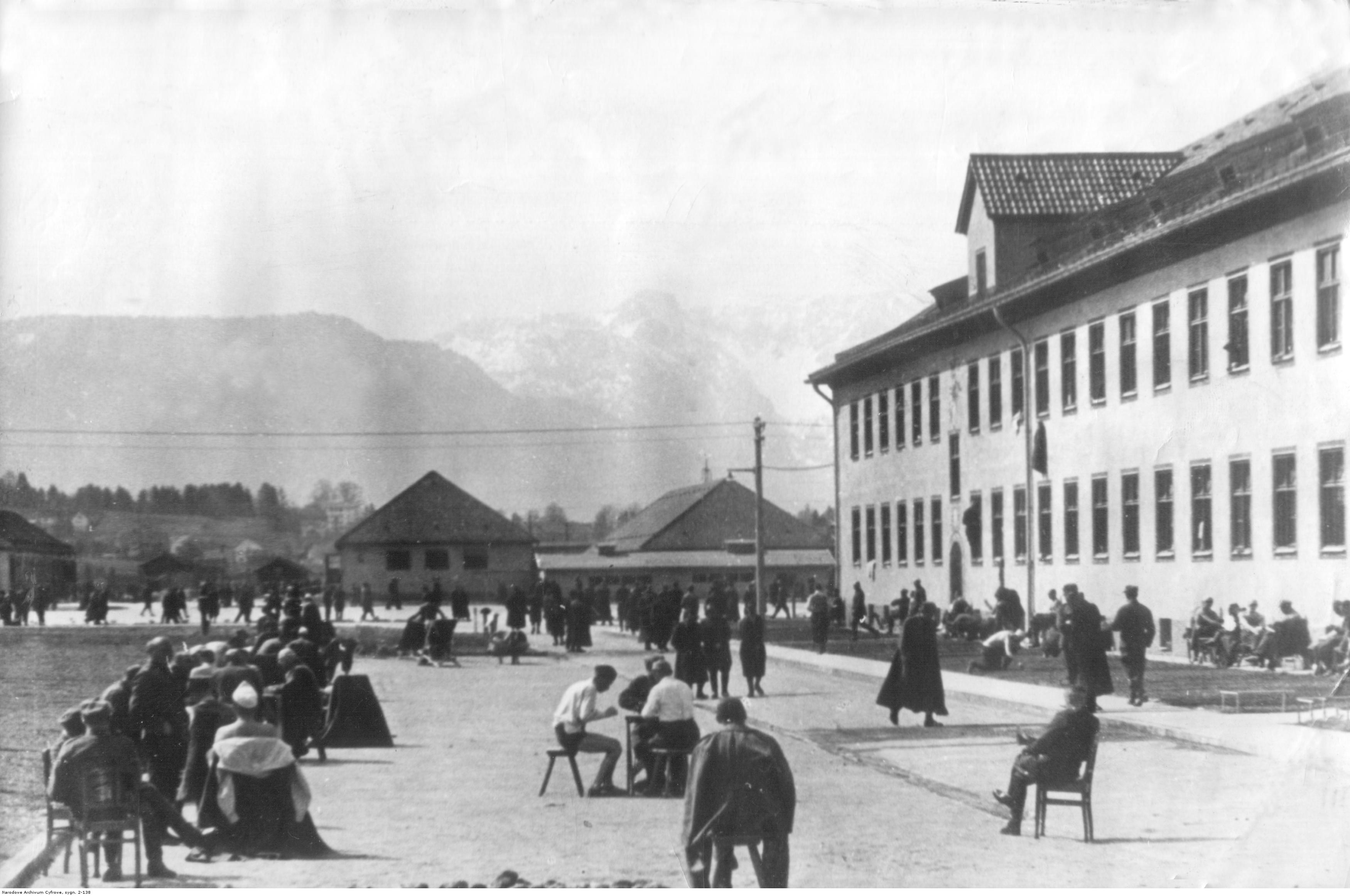 Teren Oflagu VII A w Murnau. Widoczni m.in. jeńcy grający w karty. Po prawej stronie fragment budynku komendy.